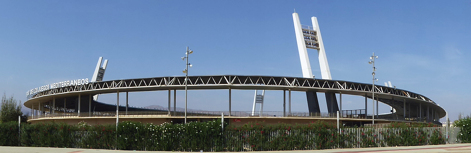 Estadio de los Juegos Mediterráneos Almeria Andalusien Spanien - Foto Wolfgang Pehlemann P1110329